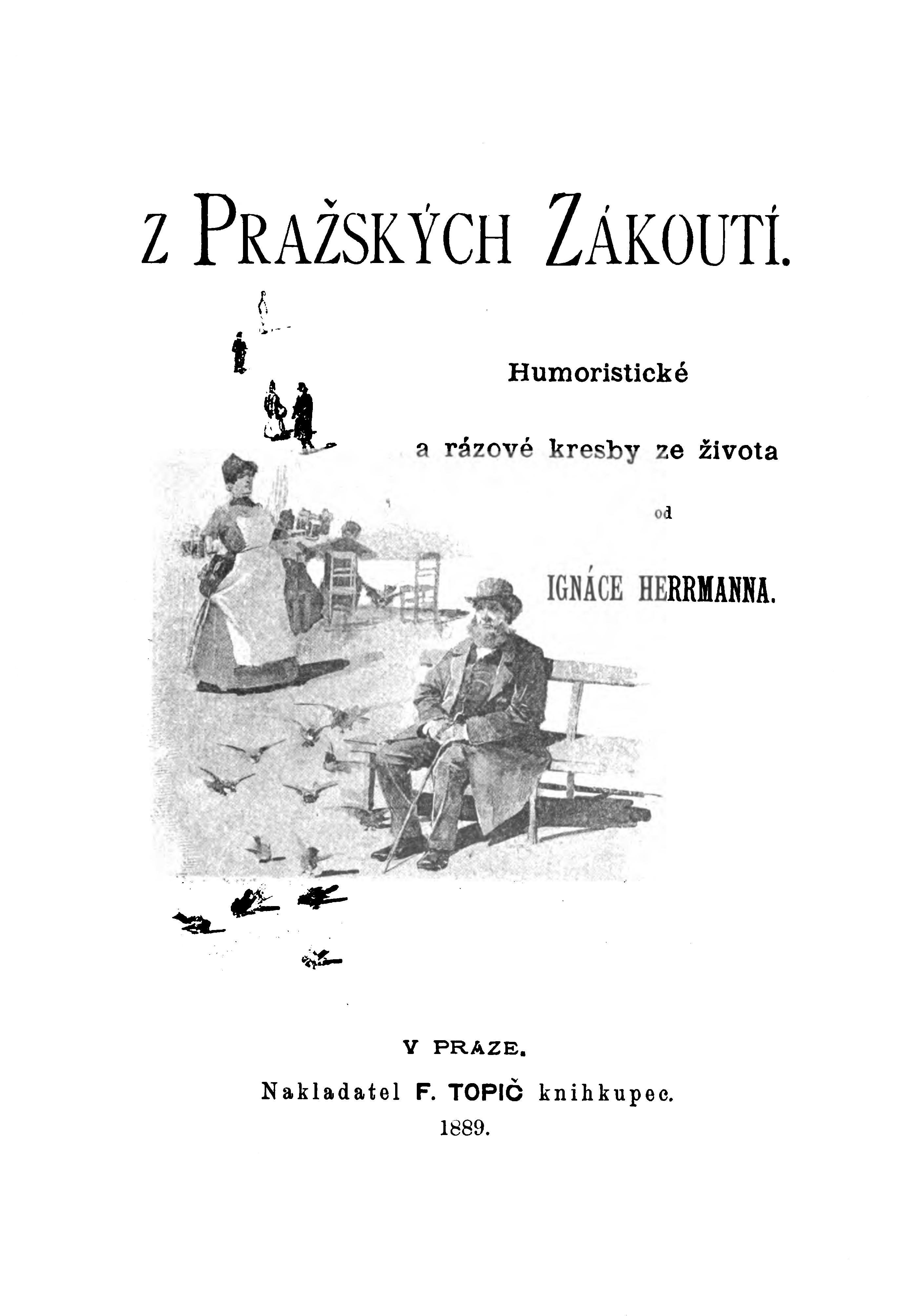 Obálka knihy Z pražských zákoutí od Ignáce Herrmanna